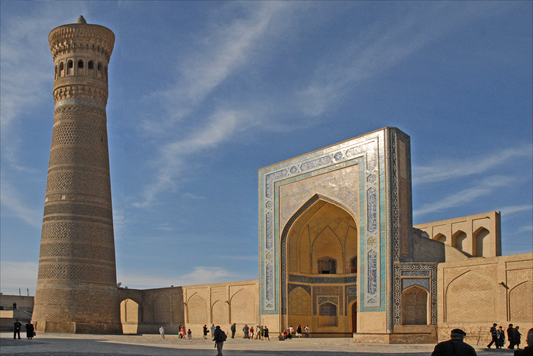 La mosquée Kalon ou "grande mosquée" (à droite) est la "mosquée du vendredi" de Boukhara. C'est l'une des mosquées les plus anciennes mais aussi les plus vastes de l'Asie centrale. Elle pouvait accueillir 10.000 fidèles. La première construction sur ce site date de 795 par les conquérants arabes. Le bâtiment actuel a été achevé en 1514, par la suite il a été embelli puis restauré au cours de l'époque soviétique. Le minaret Kalon (à gauche) a été construit en 1127 par le Karakhanide Arslan Khan. Haut de 48m, il servait à appeler à la prière mais également, au 17ème siècle, à jeter dans le vide les condamnés à mort. Une autre fonction était de servir de phare pour les caravanes arrivant du désert car un feu était allumé à son sommet chaque nuit. De forme conique, il est décoré de motifs géométriques réalisés en briques. Le minaret a été restauré dans les années 1930 puis dans les années 1970 à la suite d'un tremblement de terre. Le minaret est le symbole de Boukhara, "Perle de l'Islam, oasis au coeur du désert Kyzyl Kum et ville sainte, une cité mystérieuse interdite aux infidèles durant plusieurs siècles.